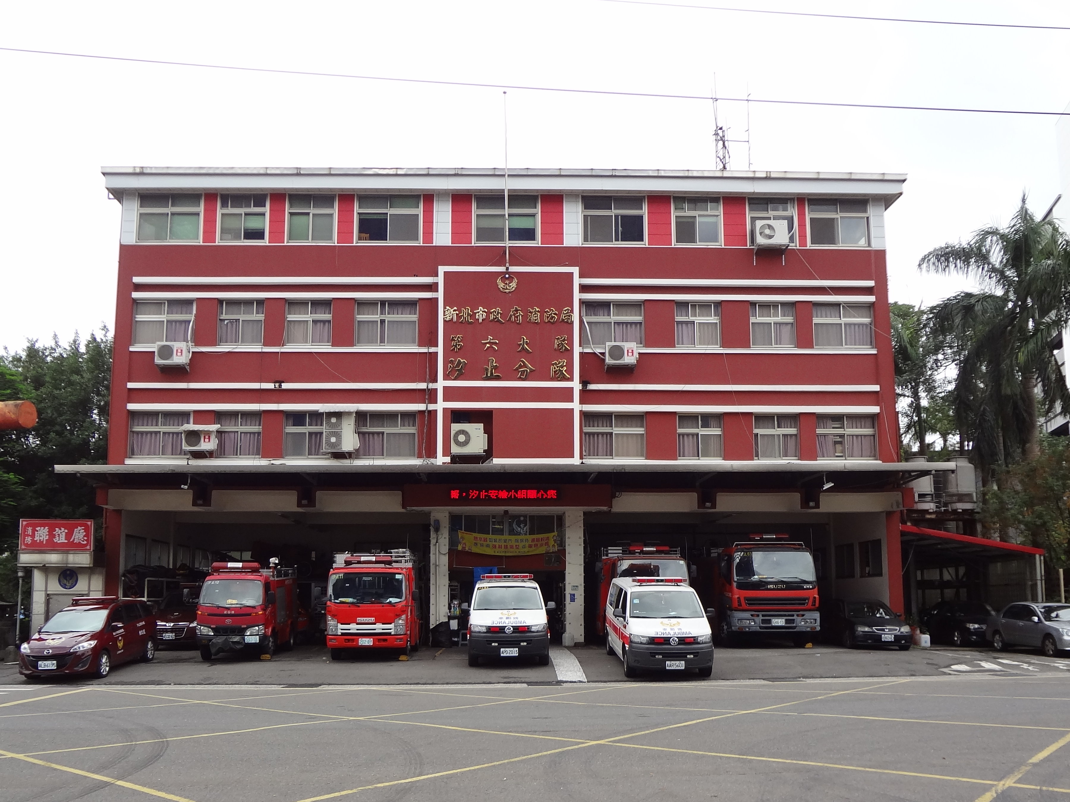 中文（台灣）: 新北市政府消防局第六大隊汐止分隊，地址：新北市汐止區大同路二段447號。